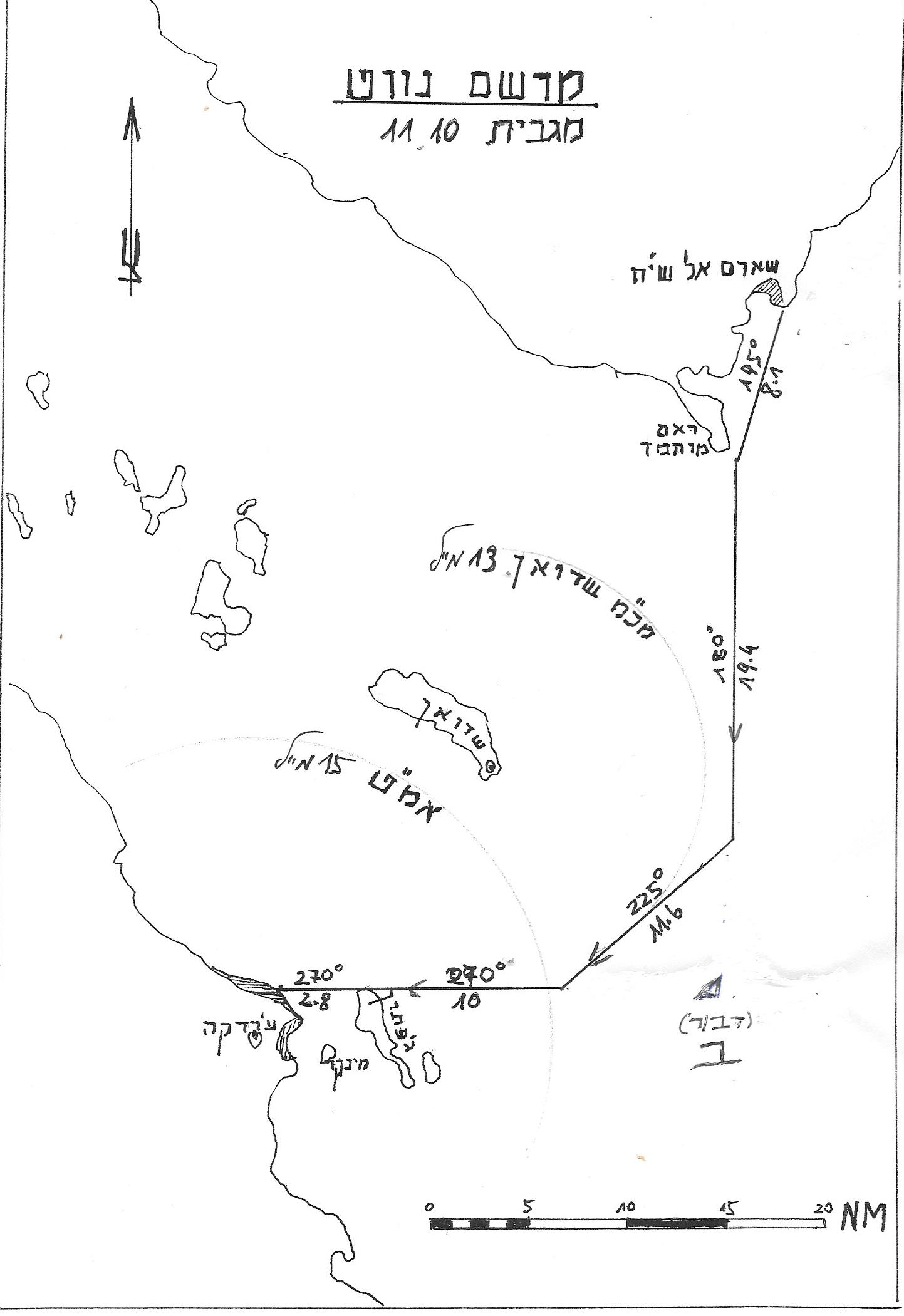 תרשים ניווט סירות הגומי לתקיפת ע'רדקה מגבית 10 ו-11